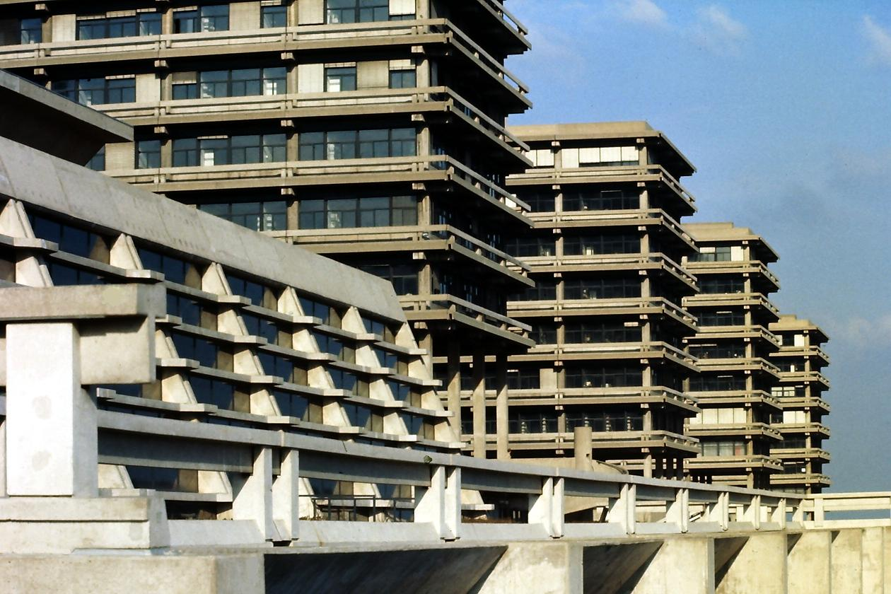 Gebäude der Ruhruniversität Bochum in den Anfangsjahren.